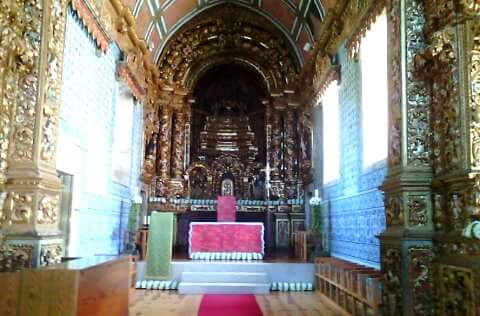 capela-mor da Igreja de Santa Maria de Vila Boa do Bispo onde se pode verificar os azulejos e a talha dourada e o altar-mor modificado